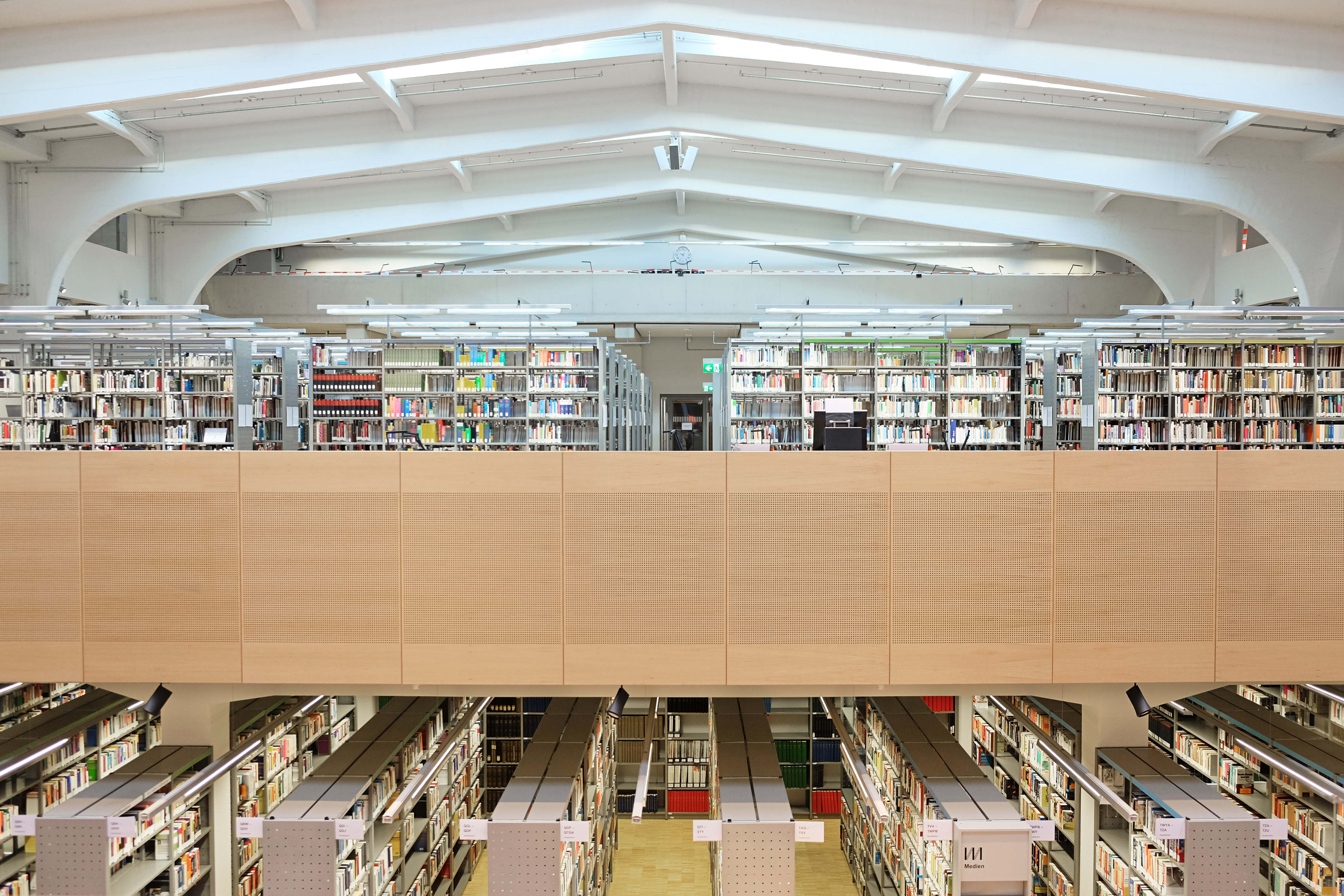 Innenansicht der Bibliothek (ehemalige Halle des Alten Schlachthof Düsseldorf)